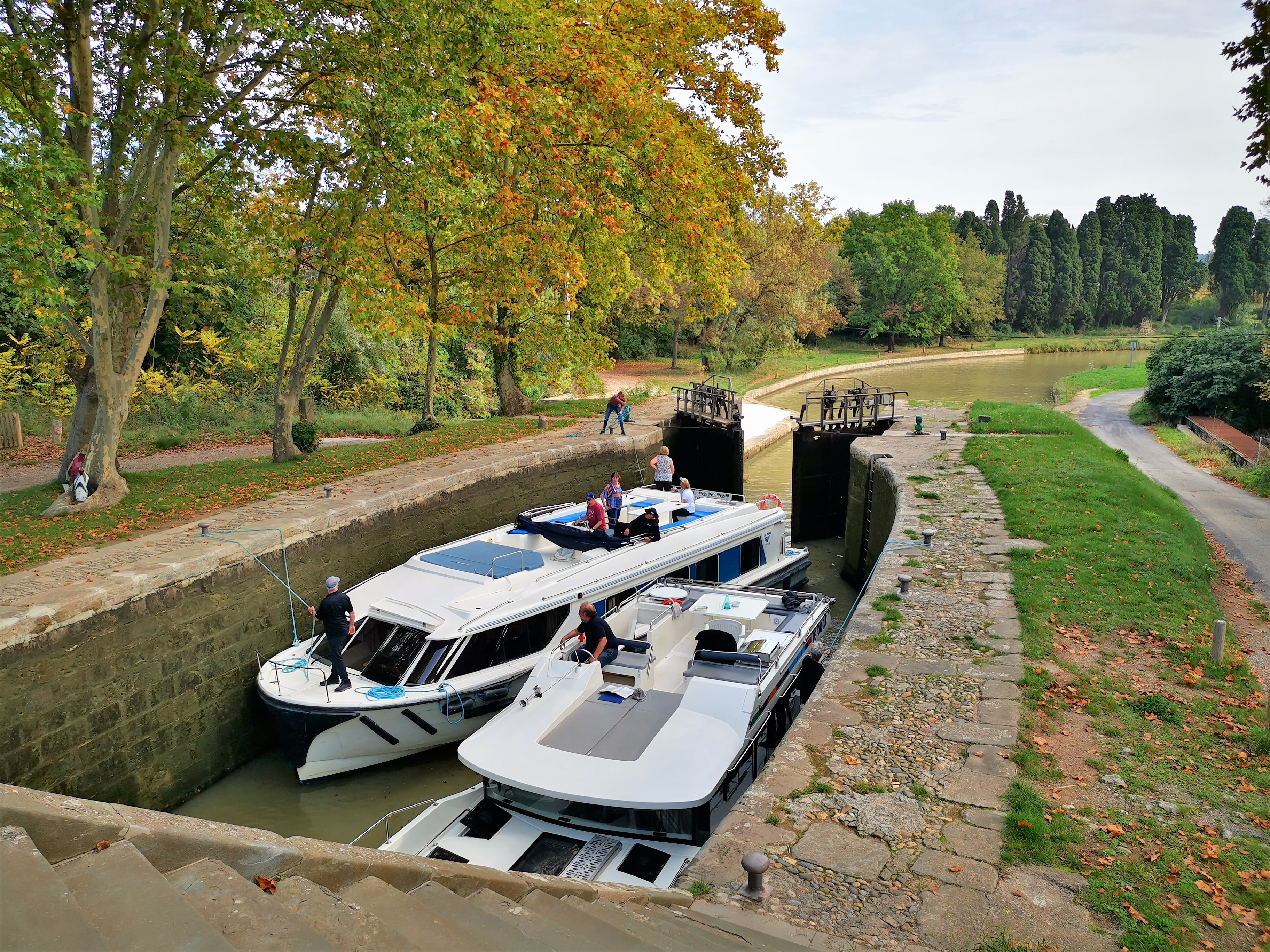 Canal du Midi, écluse à chambre double d'Ognon (N° 73&74), Hérault.